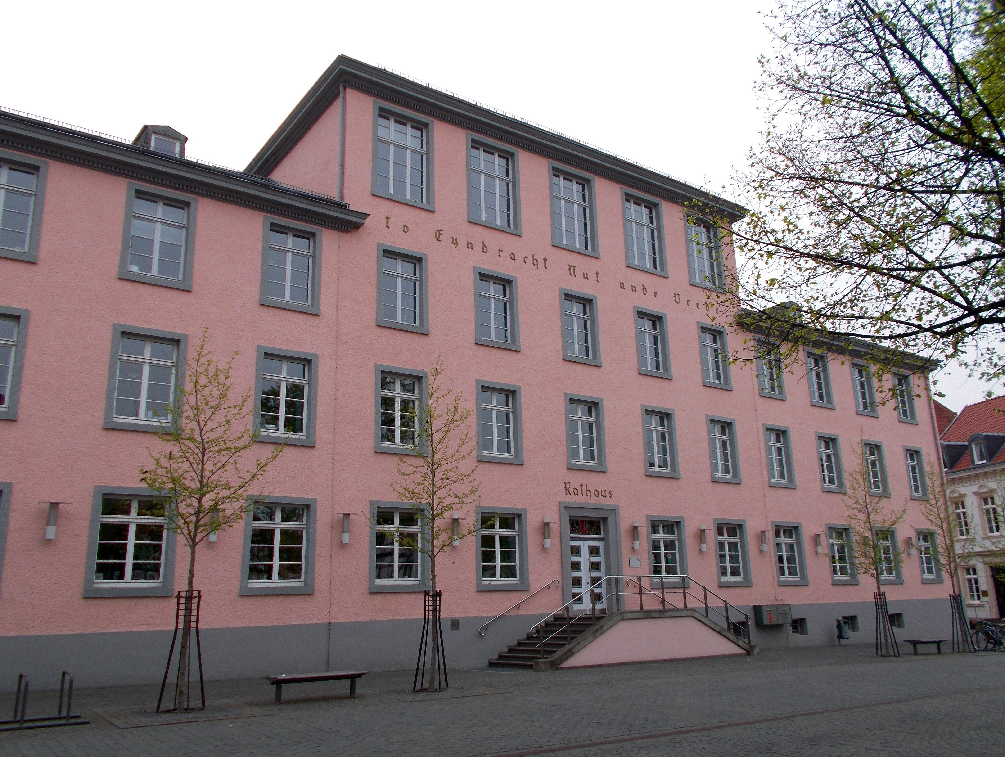 Rathaus in Soest, Ostflügel am Vreithof, ursprünglich Gebäude des städtischen Archigymnasiums von 1821 bis 1928 (Germany)